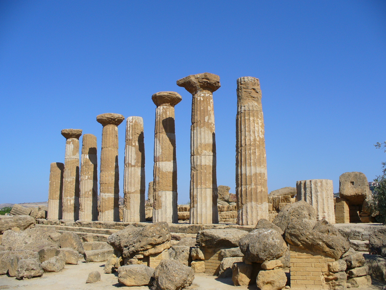 "Tempio di Ercole" - Vale dos templos de Agrigento (antiga Akragas)